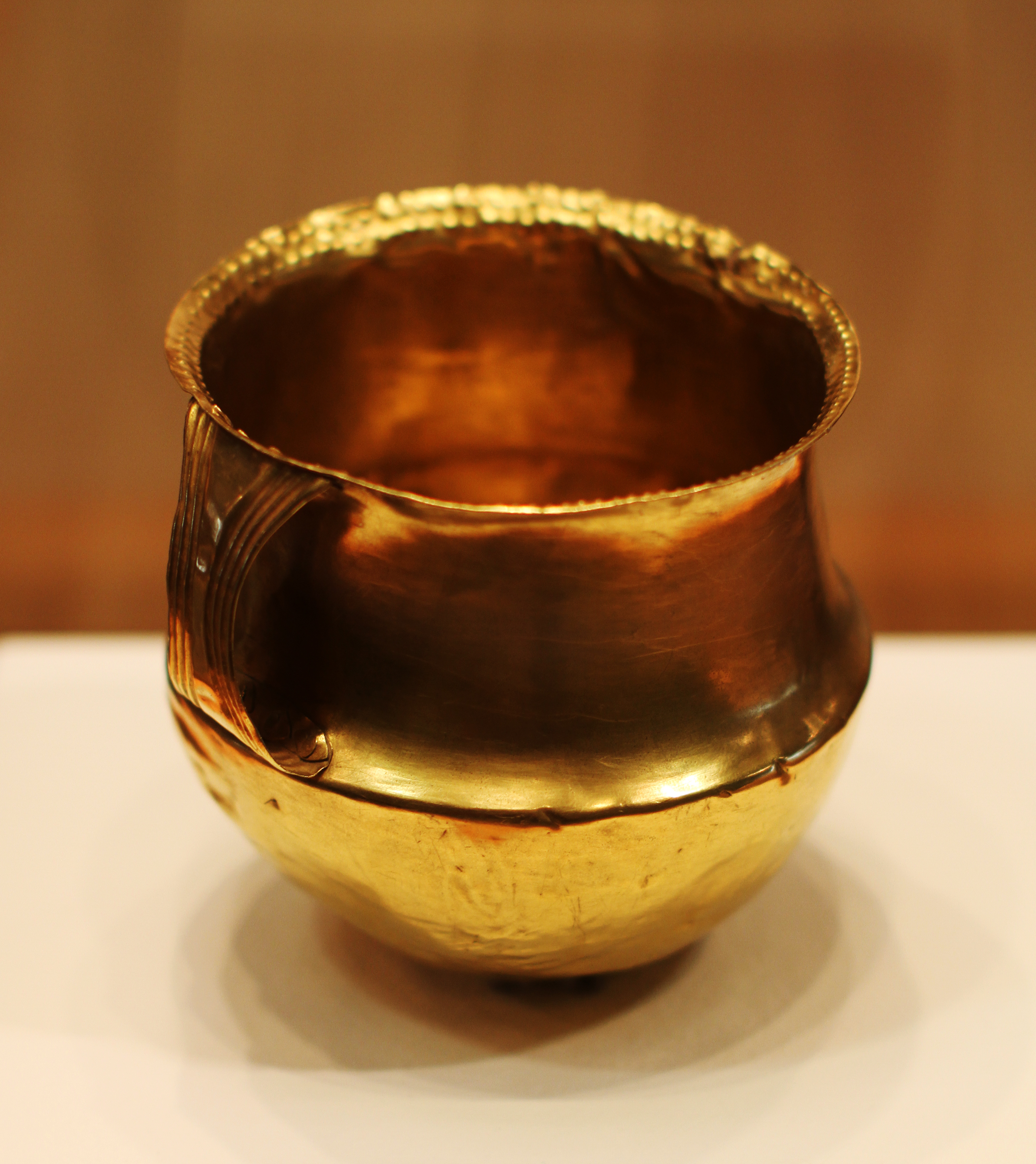 Gemeinde Wachtberg-Fritzdorf. Der 1954 geborgene Goldbecher ist möglicherweise Mykenischen Ursprungs und wird in die Zeit 1800 - 1600 v. Christus datiert.